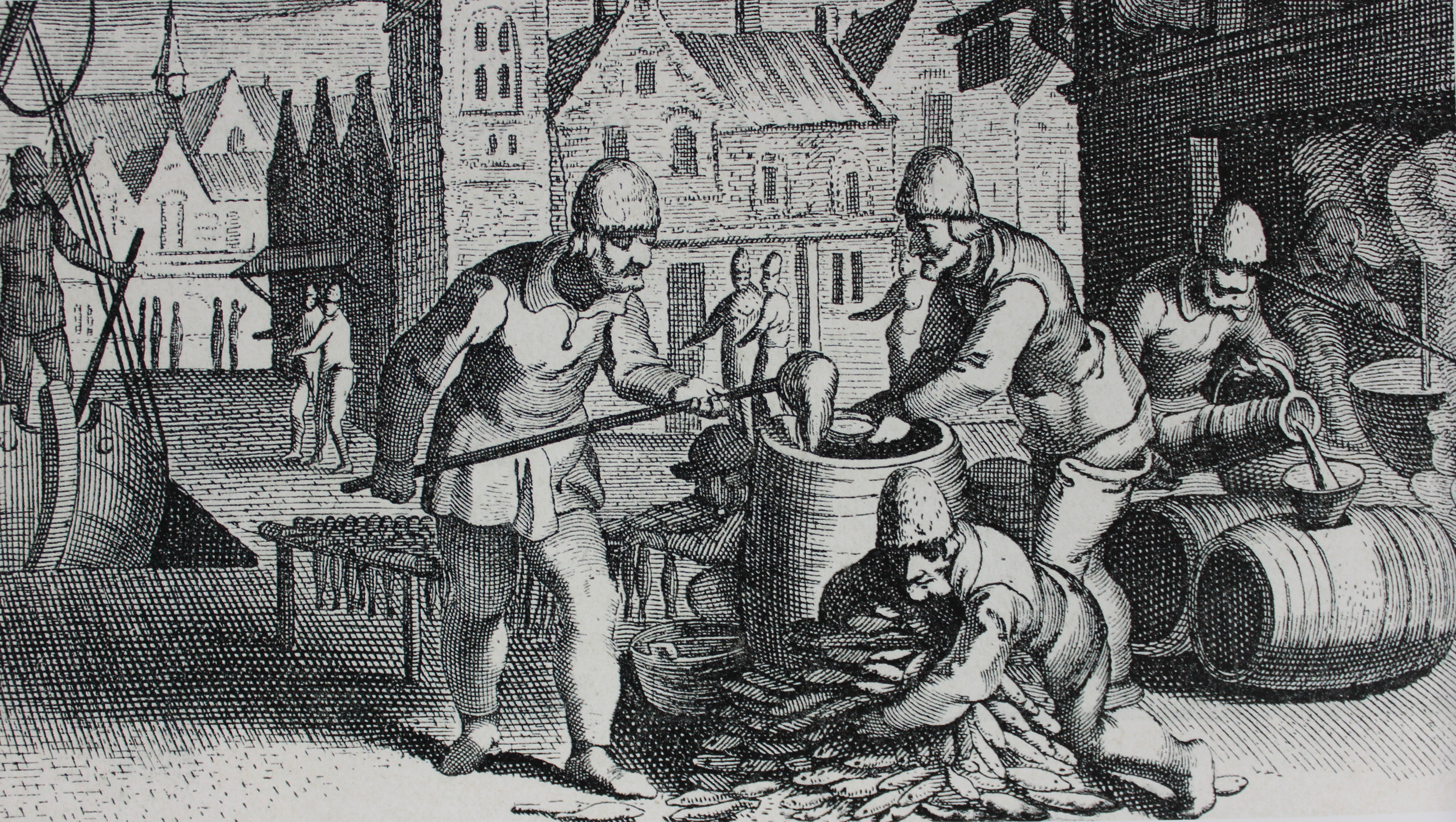 Salz als Konservierungsmittel (Historisches Bild aus 1618 in Niederlan)